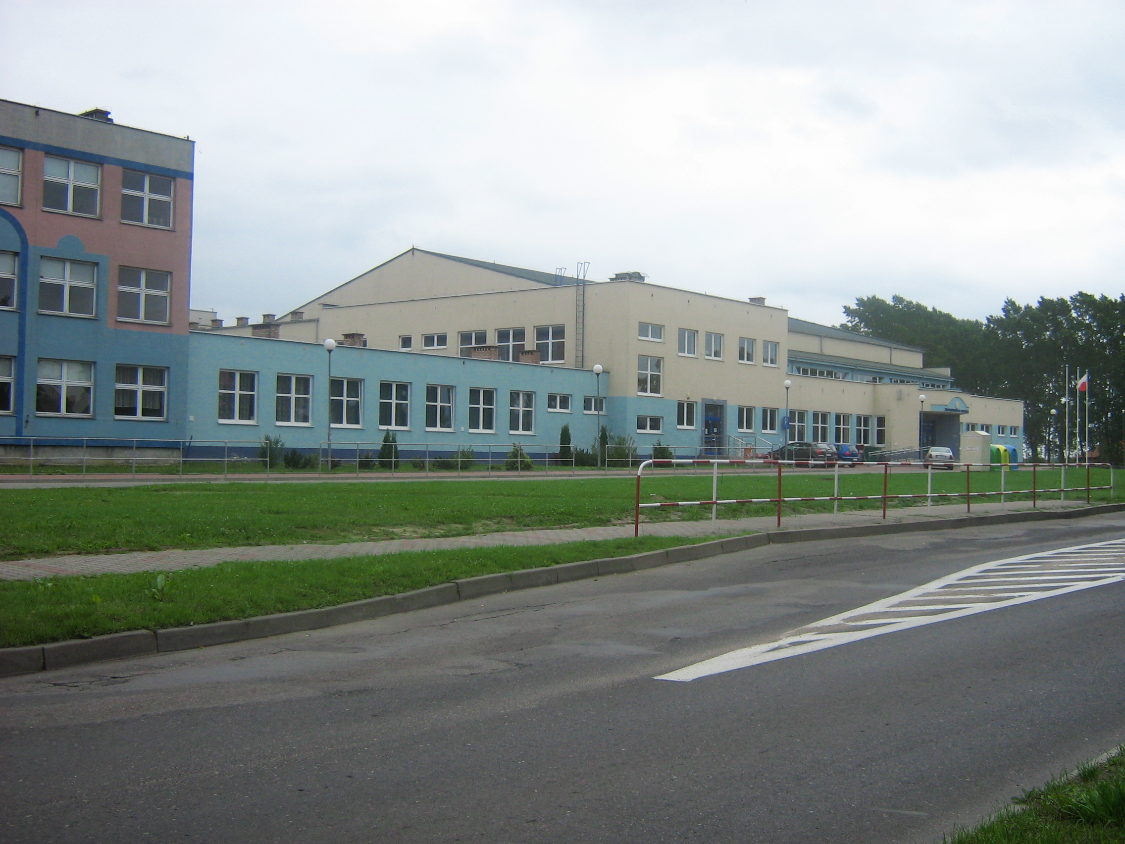 Hala Widowiskowo-sportowa w Kamieniu Pomorskim